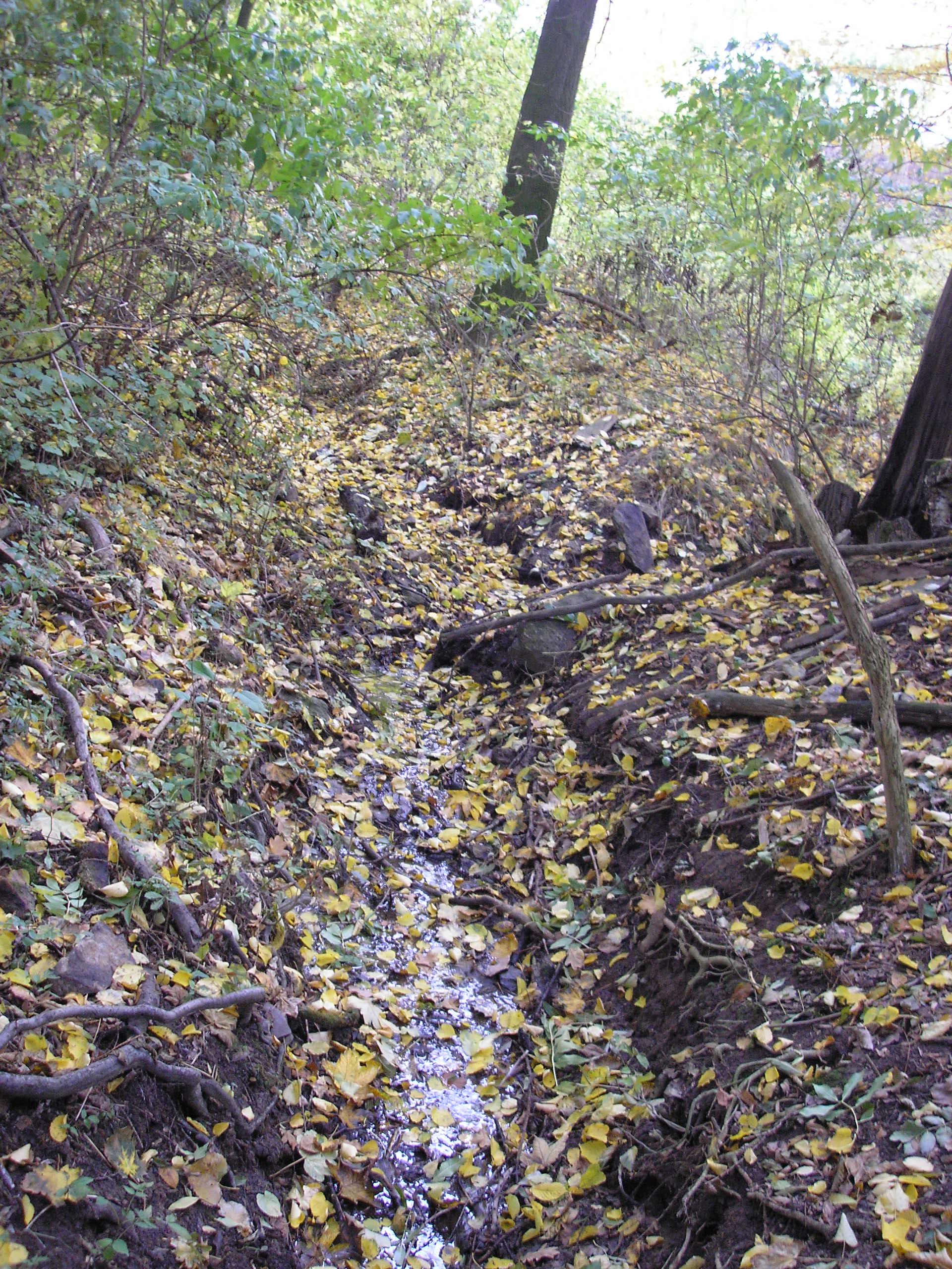 Prameniště Hořanského potoka a zároveň přítok z poldru